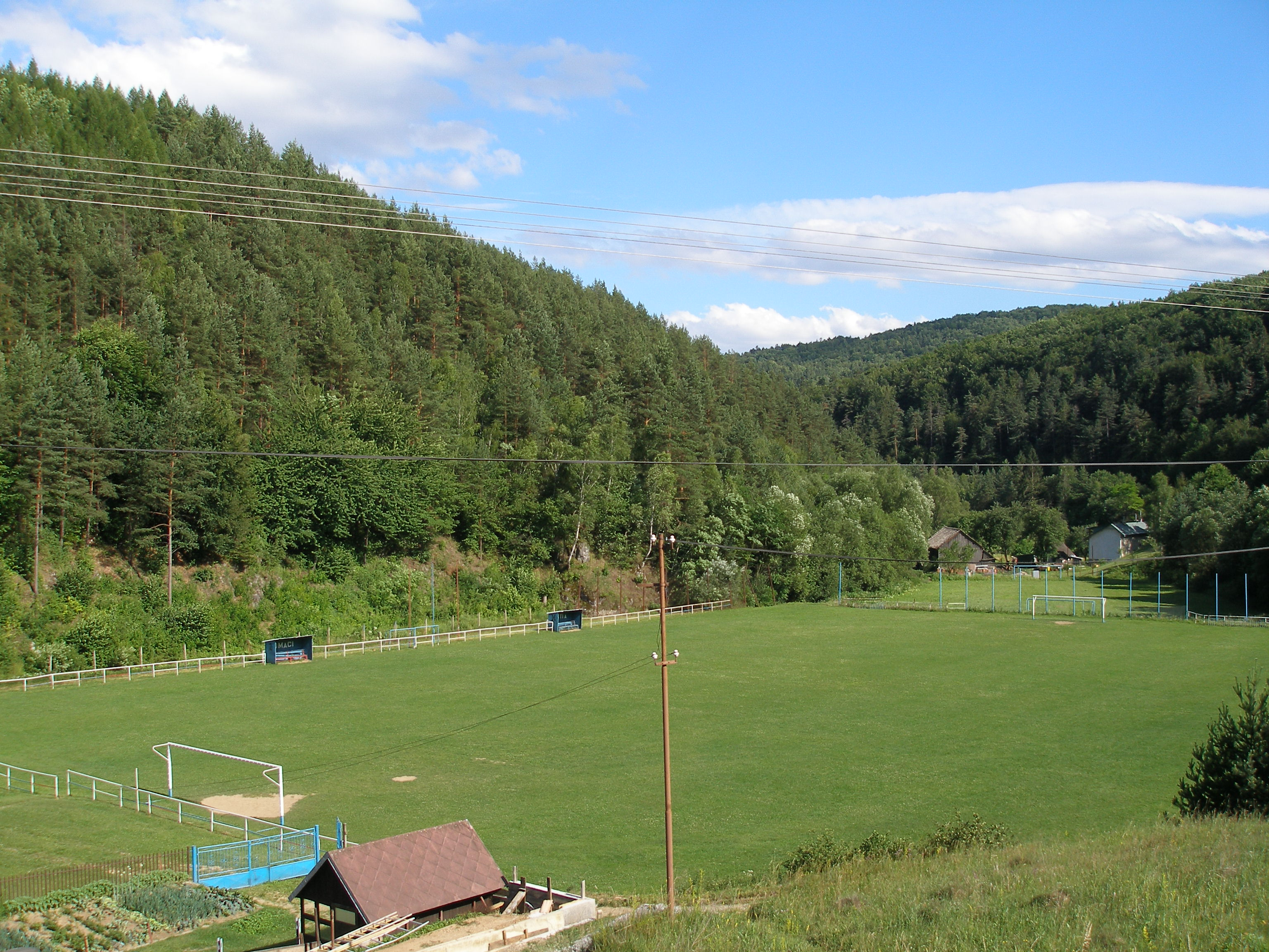 Futbalové ihrisko v obci Miklušovce, okr.Prešov, región Šariš, Šarišská vrchovina. V pozadí Miklušovský mlyn.